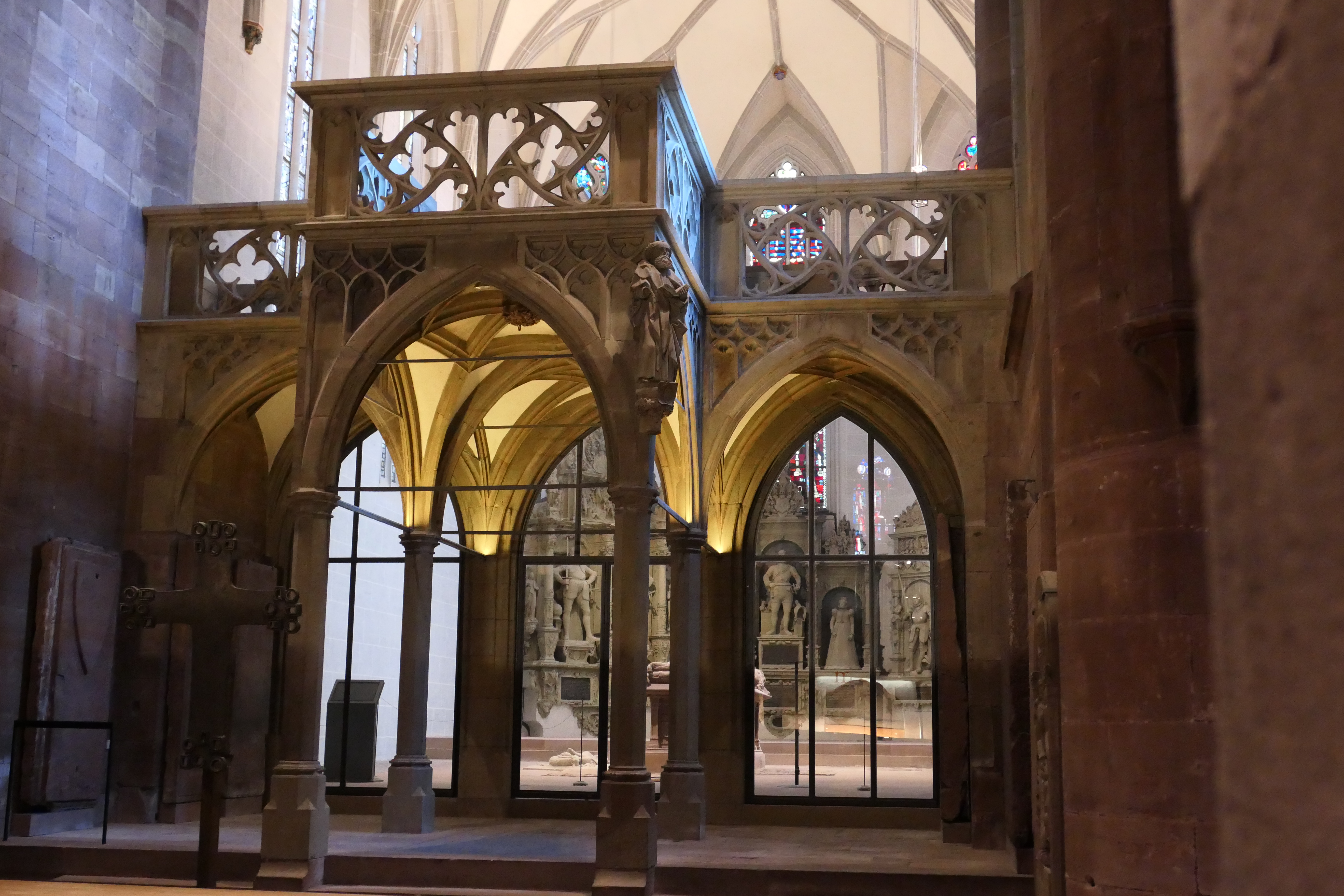 Lettner St. Petrus Maßwerk Fischblase. Stiftskirche St. Michael Pforzheim (Schlosskirche) Spätgotischer Lettner (1460) zur Abtrennung des neu erbauten Stiftschors.